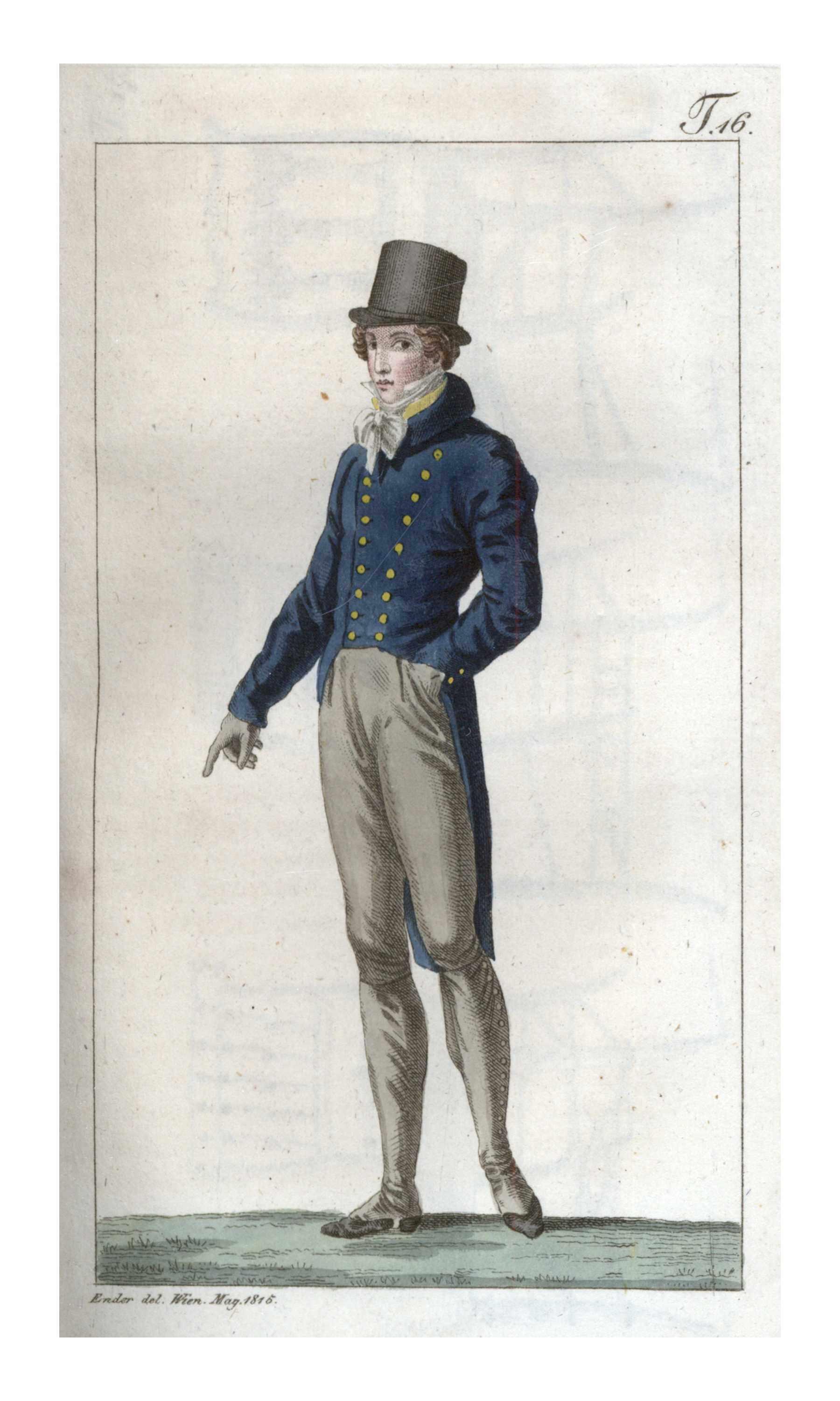 junger Herr in Wien im Negligé